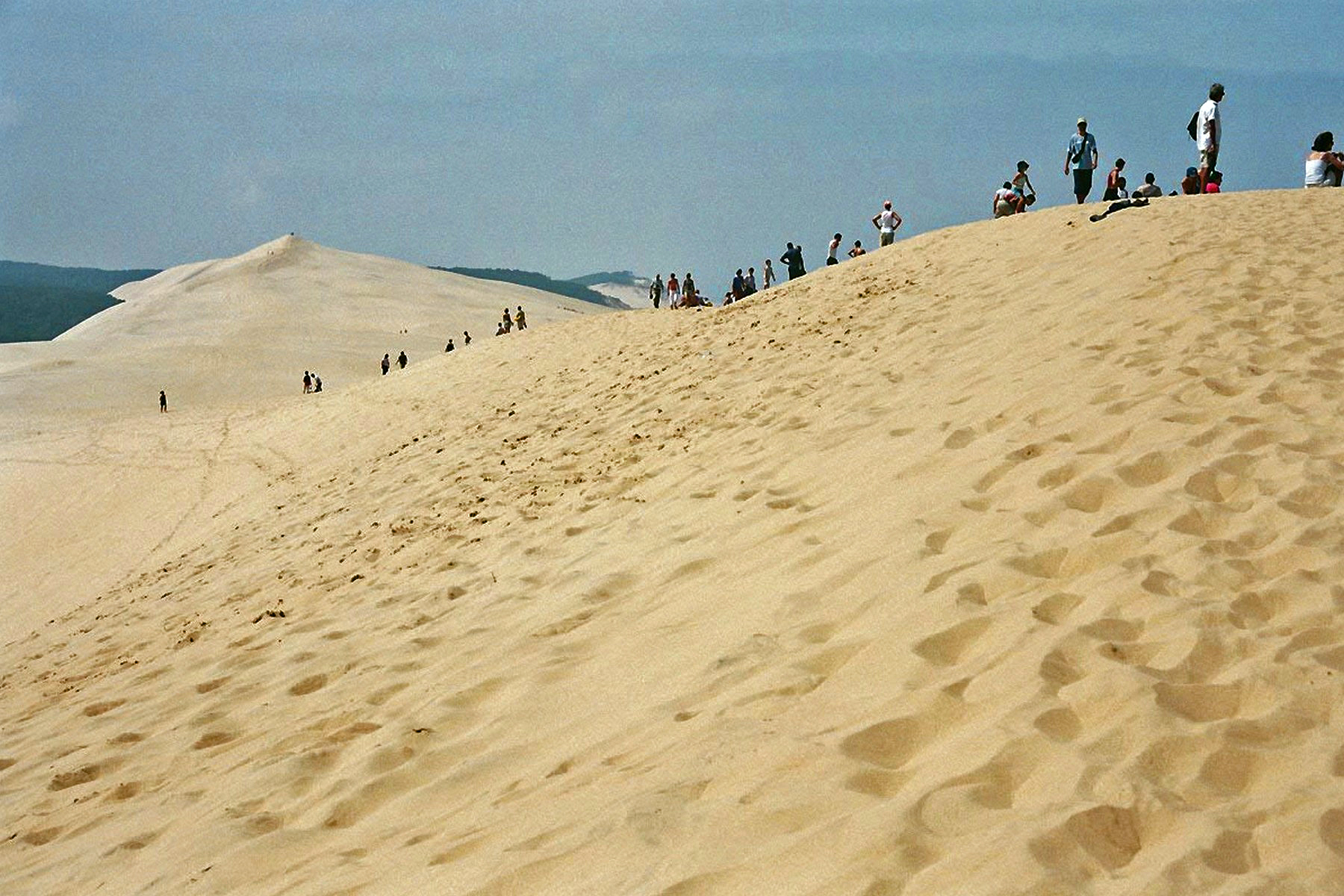 Dune du Pyla